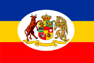 State flag of Mecklenburg-Schwerin (1900–1918)